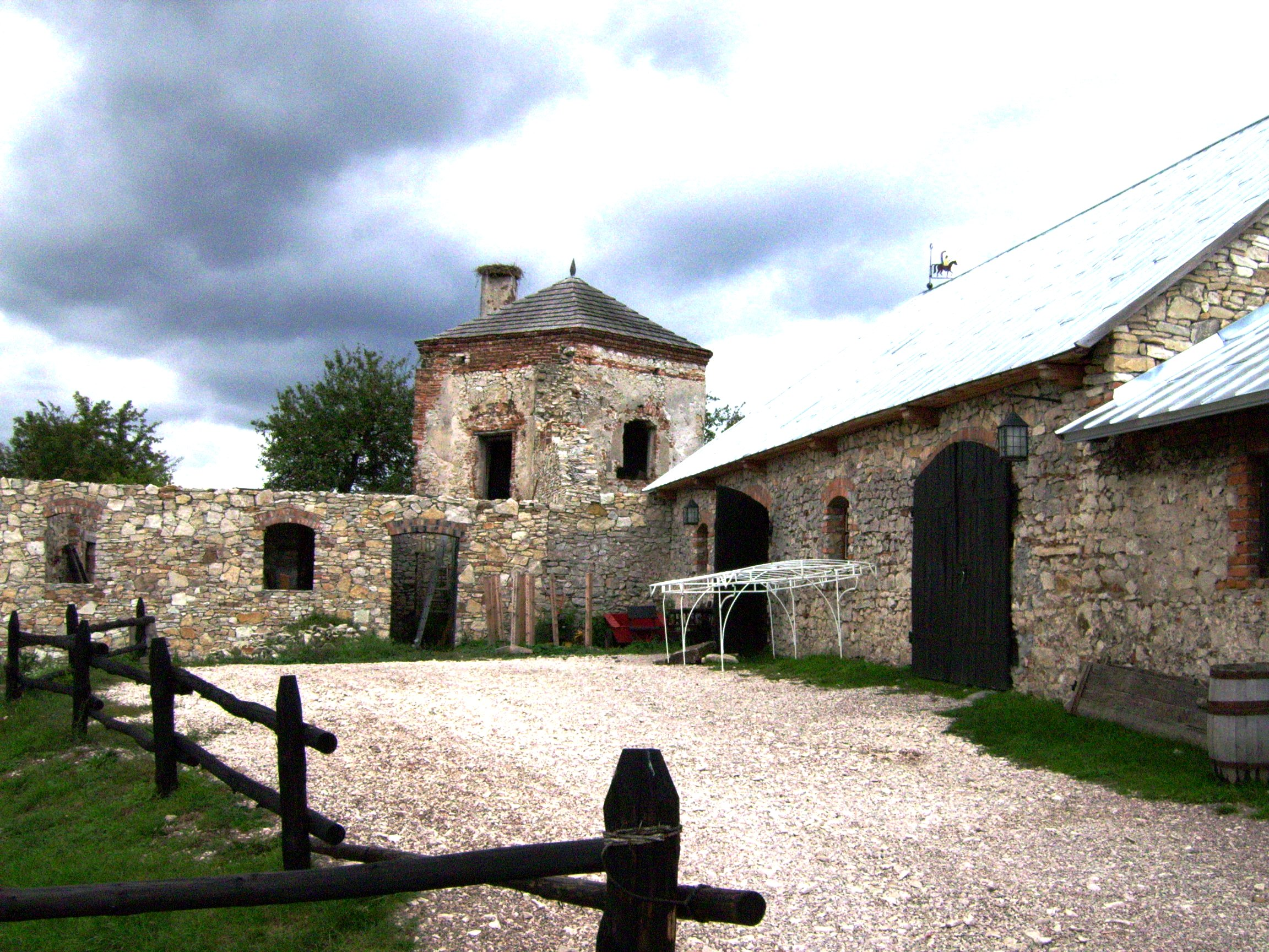 Sobków - zabudowania gospodarcze (zabytek nr rejestr. A/159)